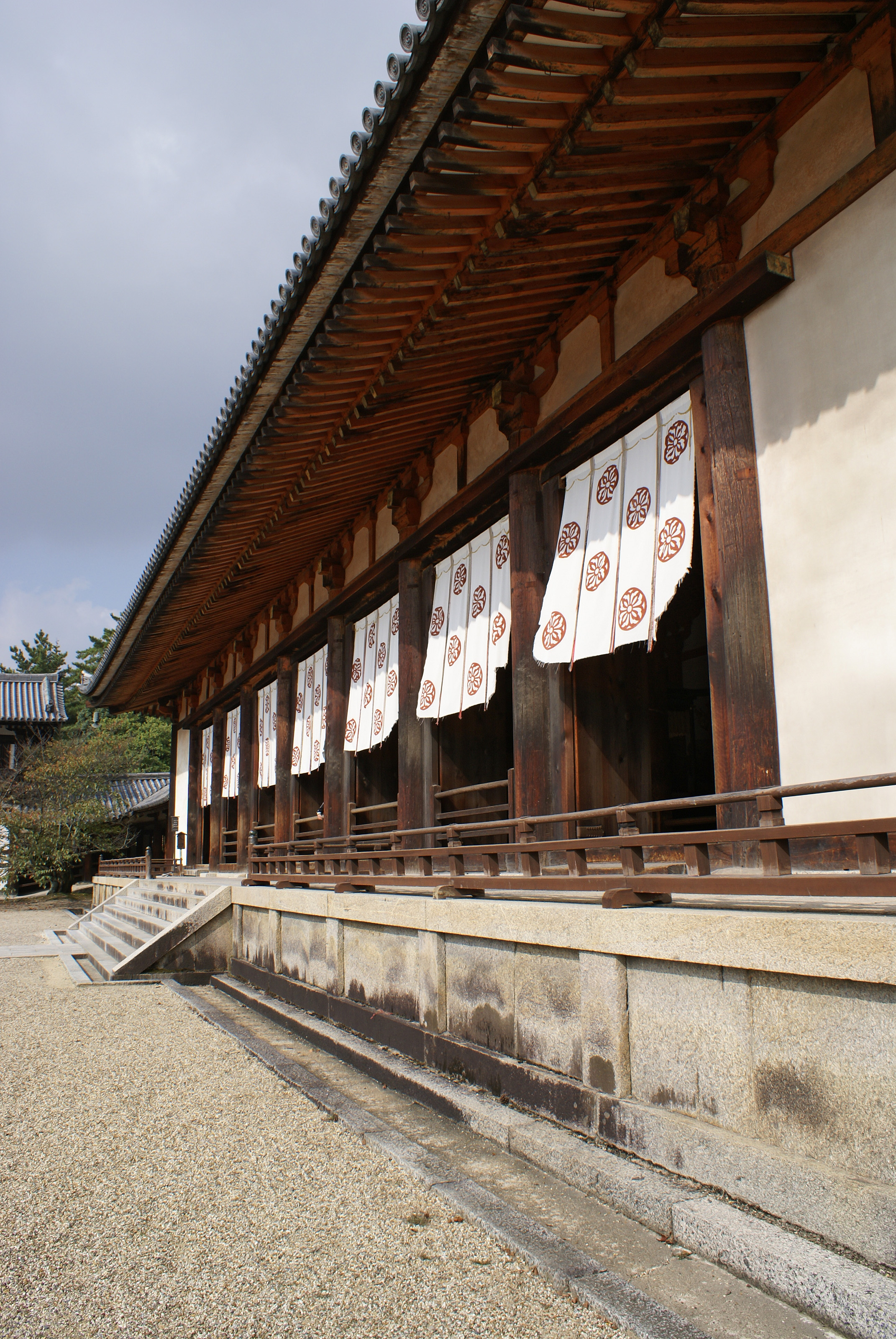 Horyu-ji in Ikaruga, Nara, Japan